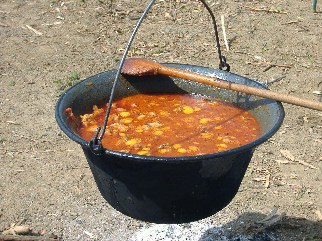 Bográcsgulyás, készült a fegyverneki gulyásfesztiválon